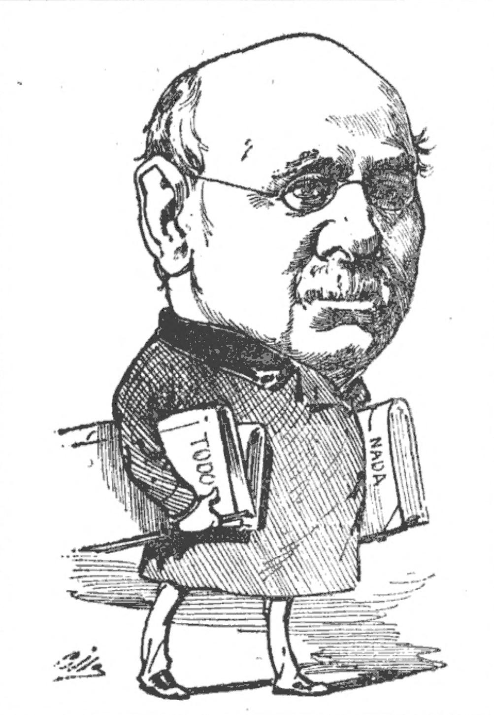 Matías Nieto y Serrano.